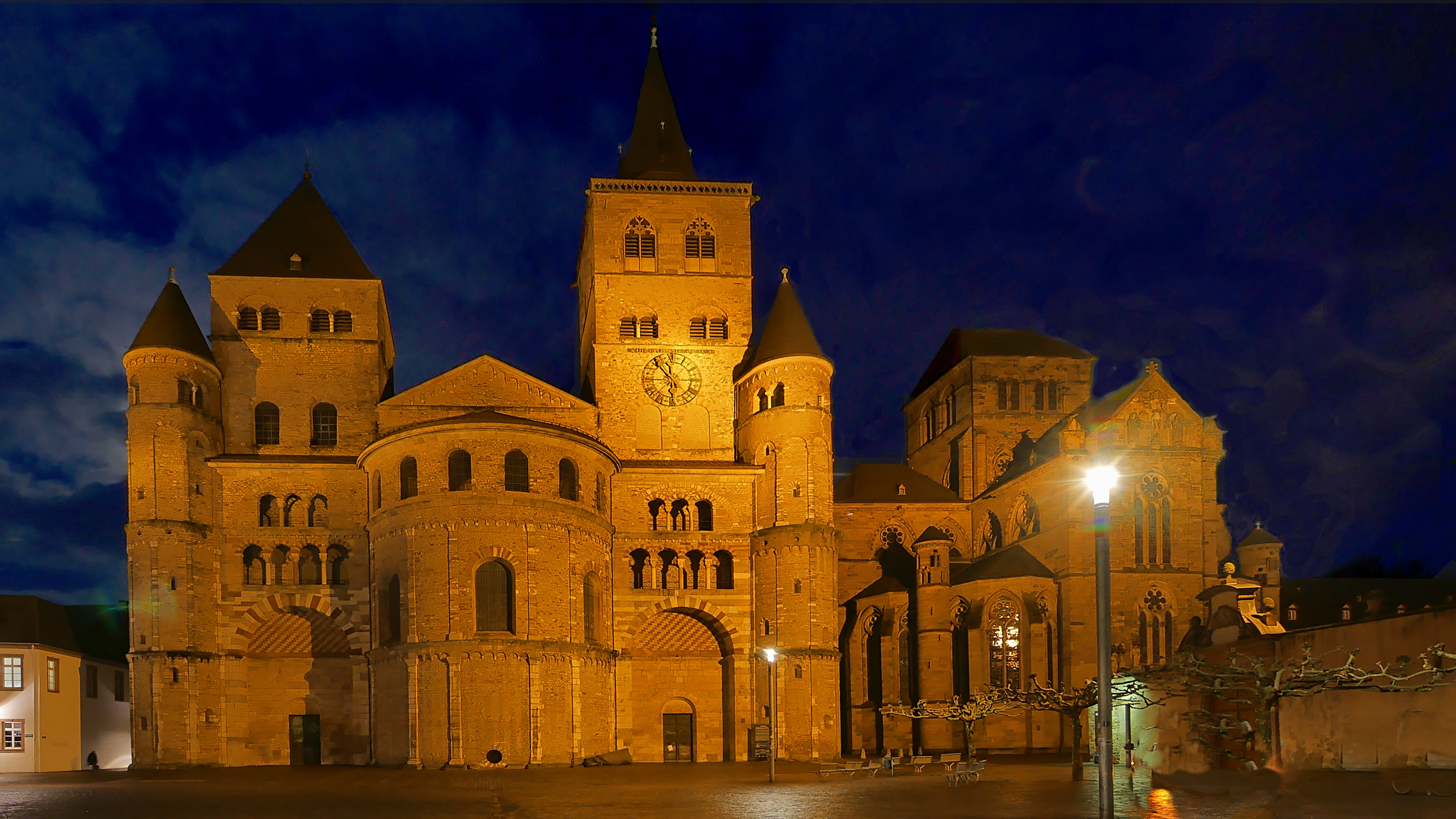 Trier: Dom (links) und Liebfrauen (rechts)